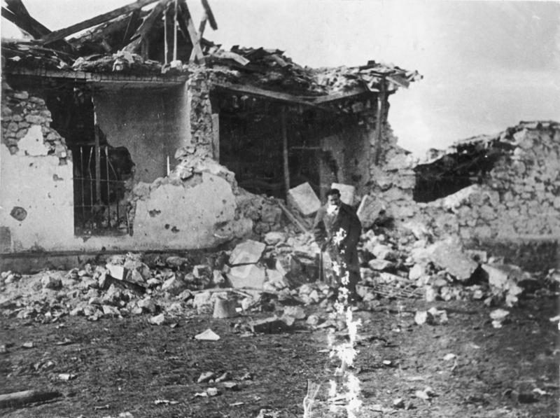 Die große Winterschlacht um Guadalajara Anfang März begann die große Offensive der nationalen Truppen auf Gudalajara, deren Hauptstoß auf der Straße Madrid - Saragossa (Carretera de Aragon) geführt wurde. Die außerordentlich schweren Kämpfe nahmen einen wechselnden Verlauf; das Kriegsglück, das sich im Anfang den Nationalen zuneigte, wandte sich später den Roten zu. Kälte, Hagelsturm, aufgeweichter Boden und scharfe Winde erwiesen sich oft als schlimmere Gegner als das feindliche Feuer. Die Soldaten der ersten beiden freiwilligen Divisionen lagen fünf Tage lang in Schlamm und Dreck, ohne warmes Essen. Zum ersten Male im spanischen Bürgerkrieg wurden ausschließlich motorisierte Einheiten eingesetzt. Das heiß umkämpfte Wegwärterhäuschen an Kilometer 80 auf der Straße nach Guadalajara. Fot. H.G. von Studnitz